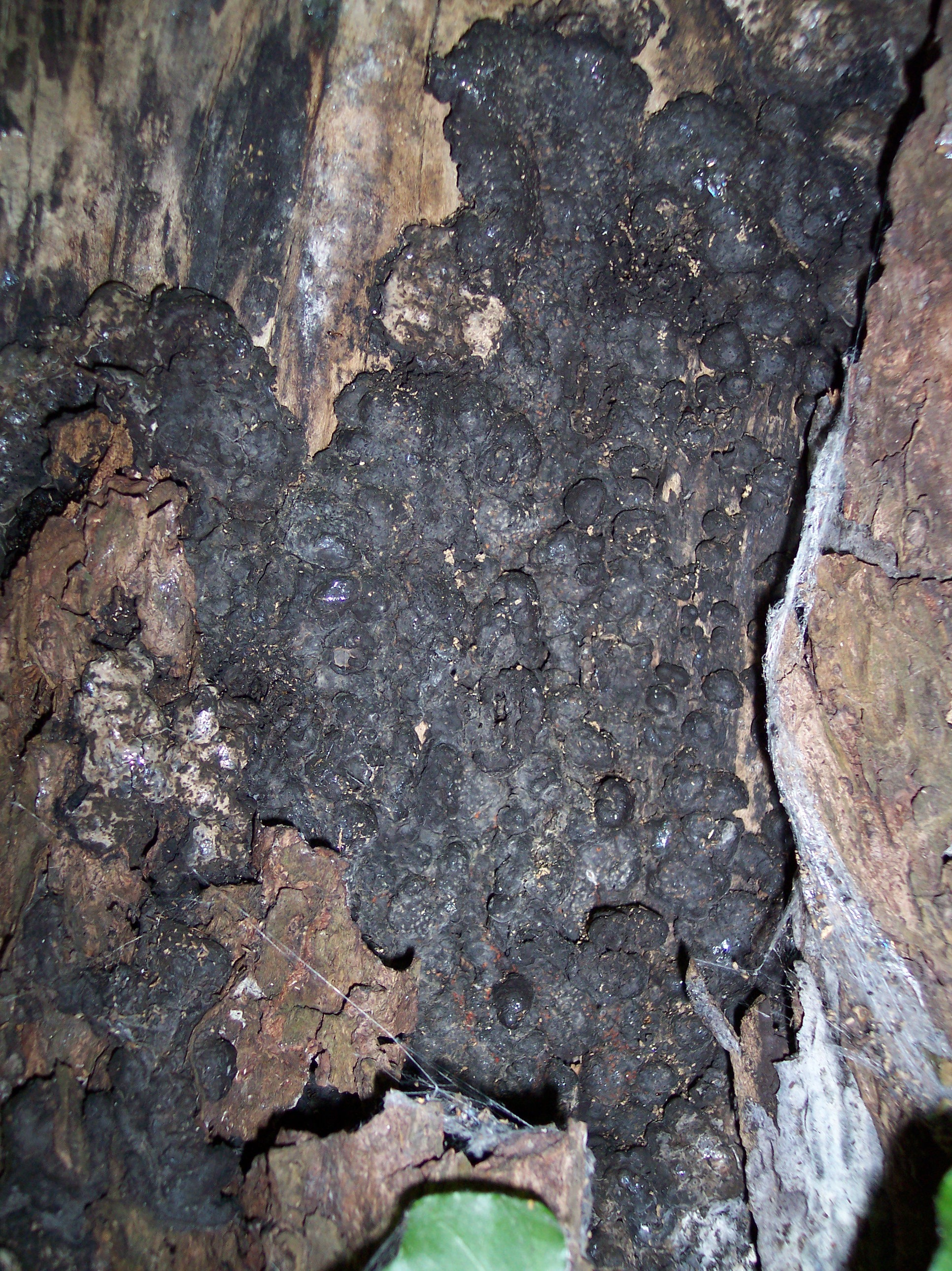 Brandkrustenpilz (Kretzschmaria deusta)